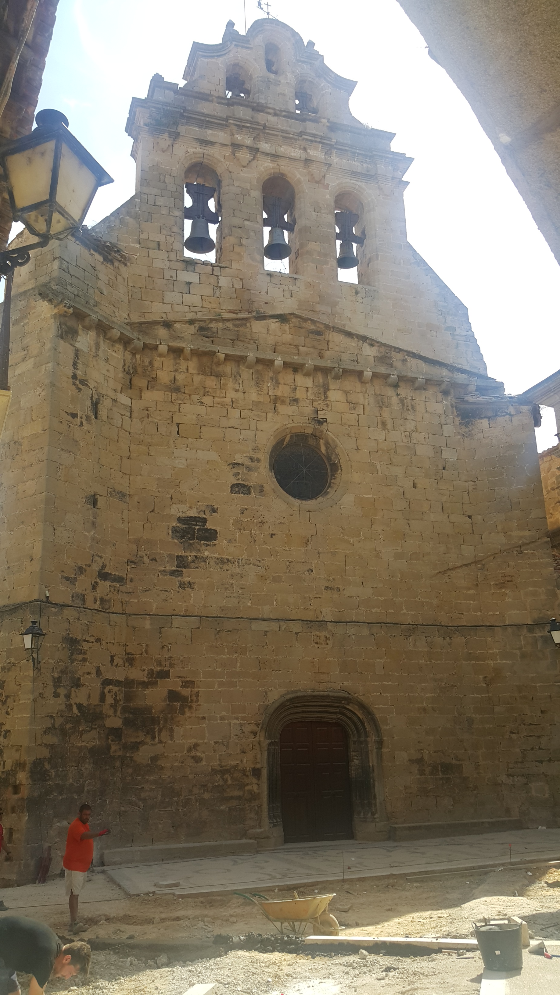 Catalonia Terra Alta Horta de Sant Esglesia de Sant Joan Baptista